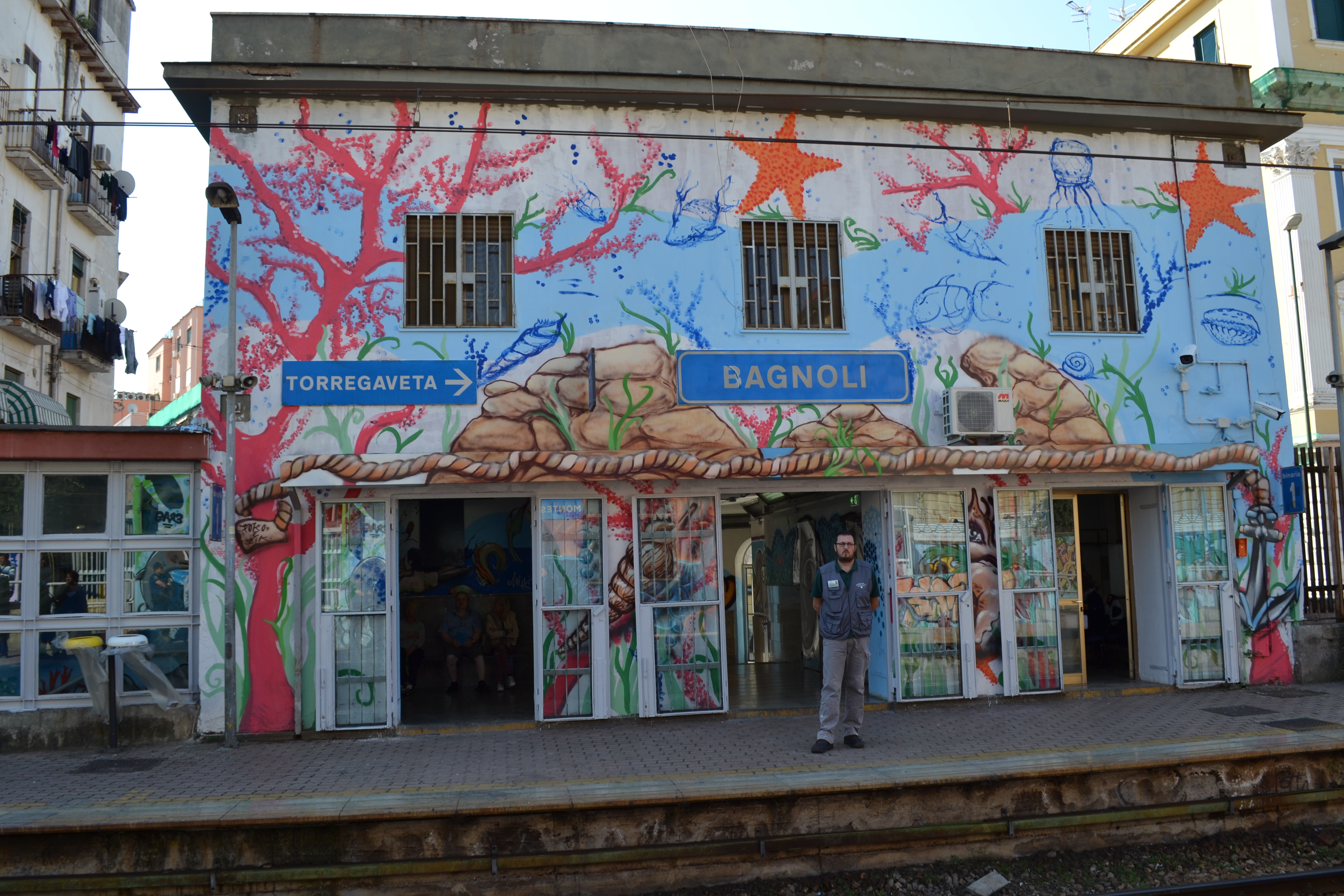 opera di riqualificazione di street art nella stazione cumana di bagnoli , organizzatore evento luca danza